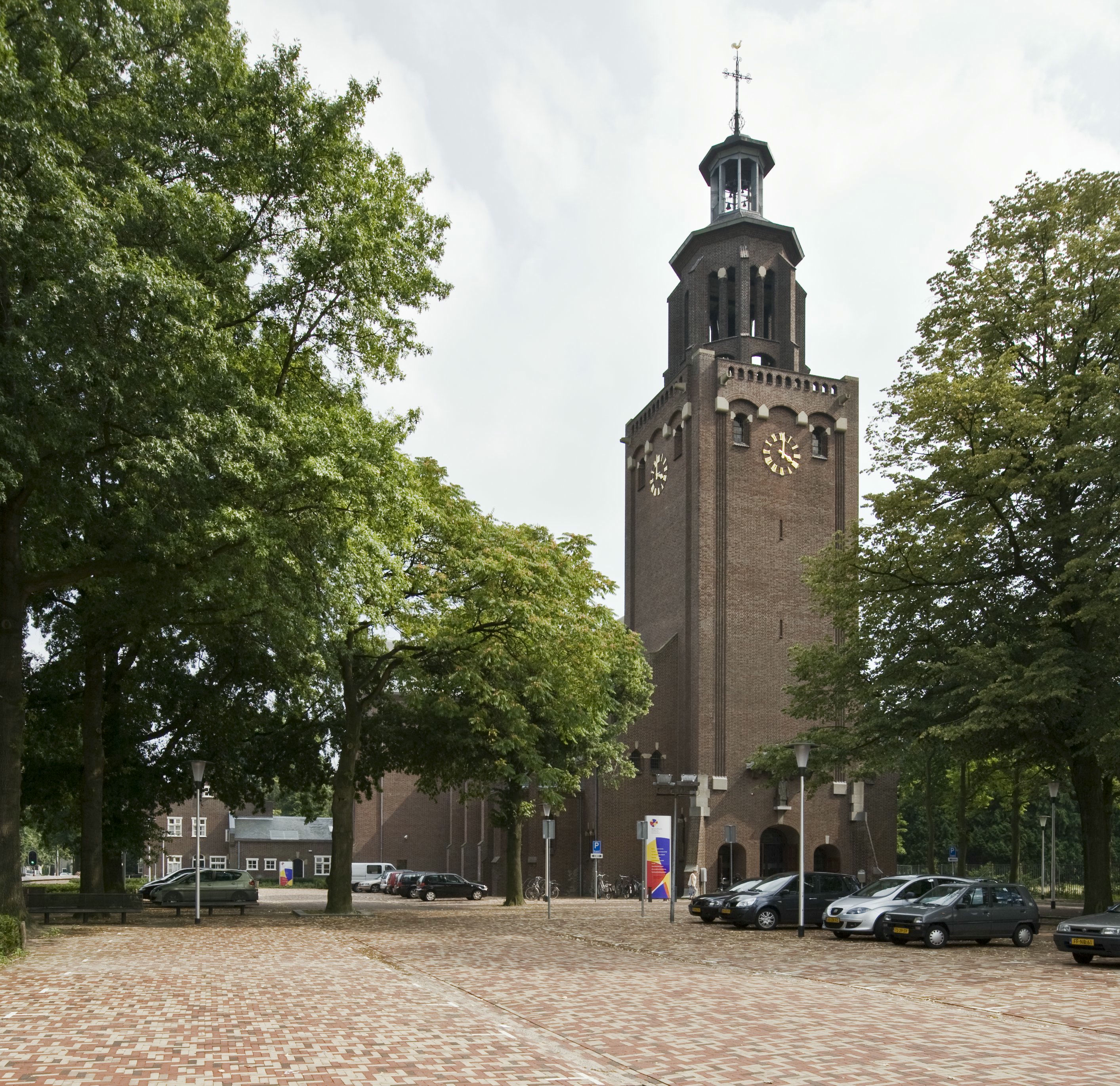 Leonarduskerk: Overzicht van de noordwest gevel van de kerk, genomen vanaf de parkeerplaats